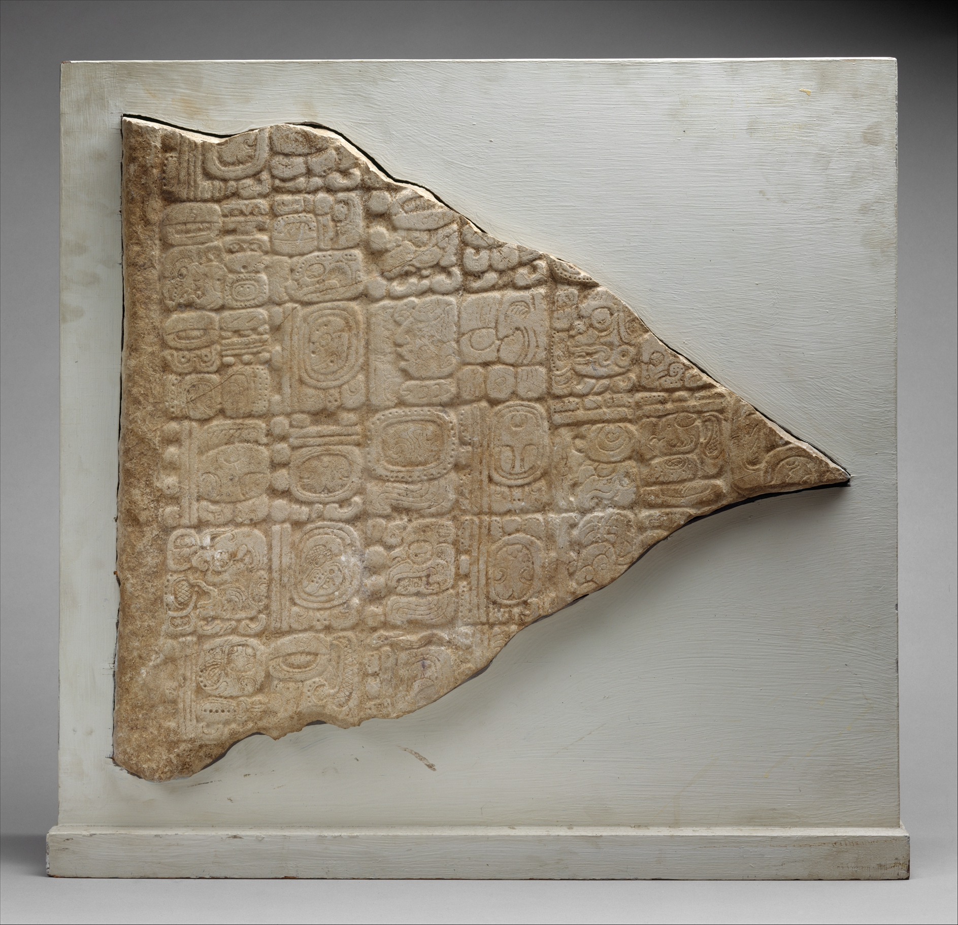 Maya; Stela fragment; Stone-Sculpture. Tortuguero Monument 6 fragment.